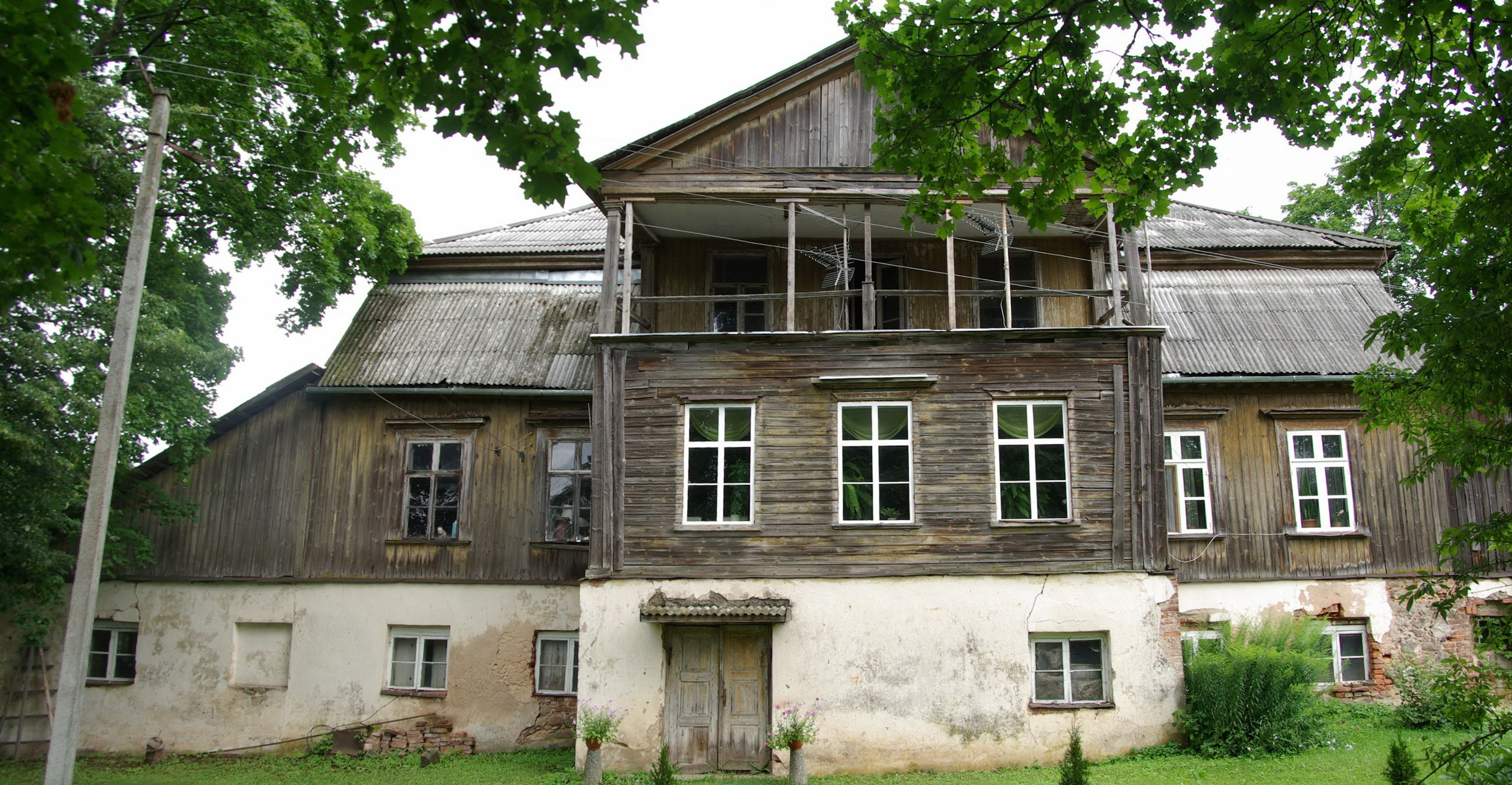 Põlva maakond, Räpina vald, Toolamaa küla